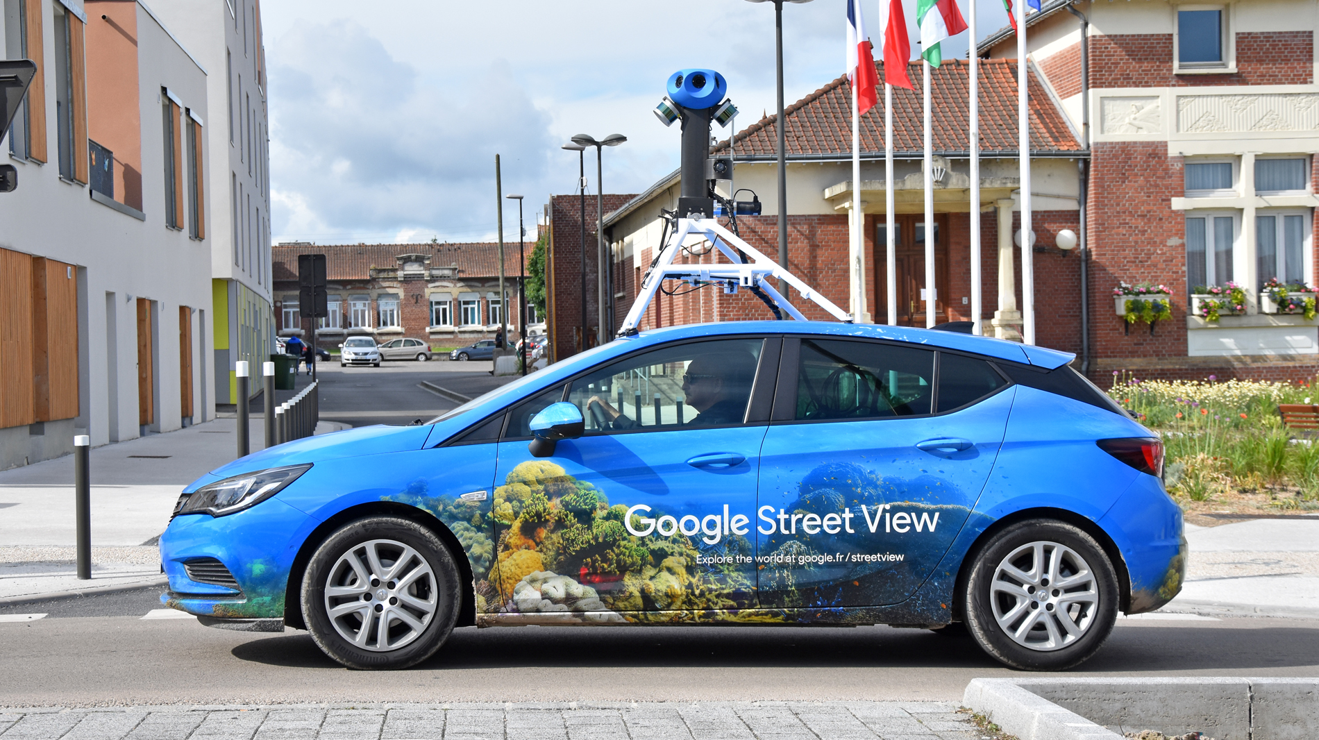 Voiture Google Street View dans la traversée de la commune de Longueau (France)